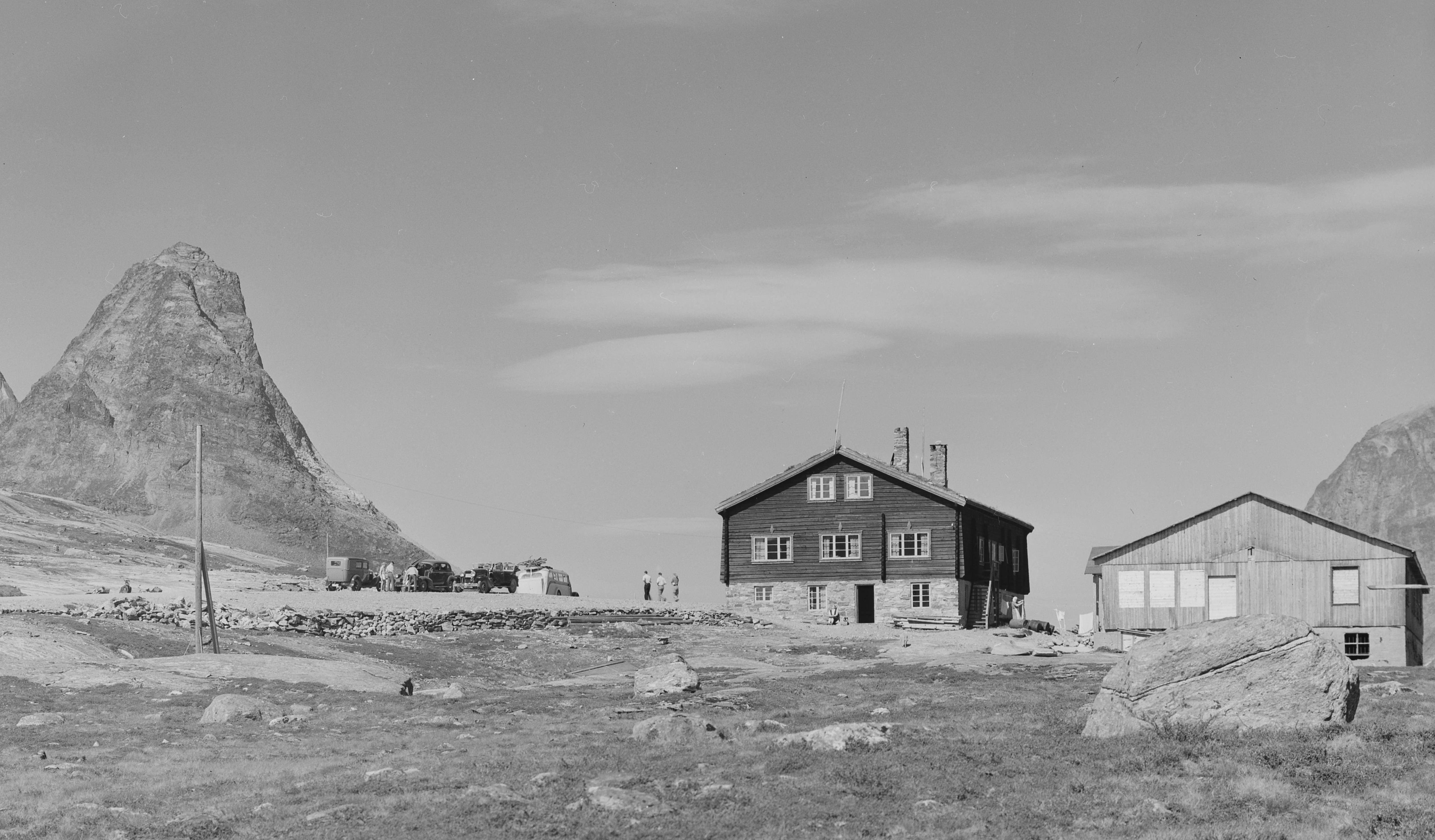 Bildet er hentet fra Nasjonalbibliotekets bildesamling. Anmerkninger til bildet var: Fotograf : ukjent Alnesreset,Bispen,Kongen, Rauma, Møre og Romsdal